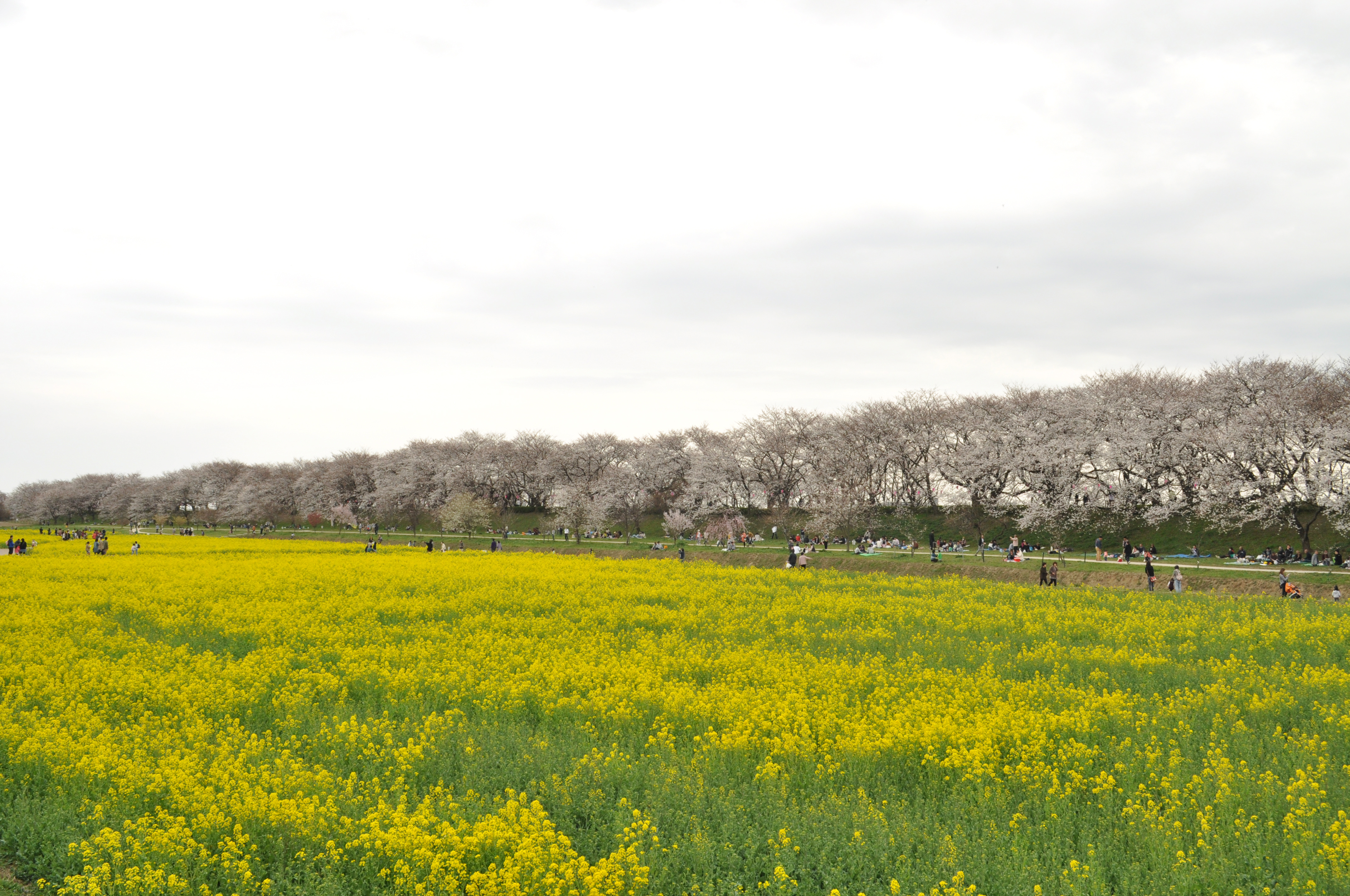 2013年3月23日の幸手市、権現堂堤